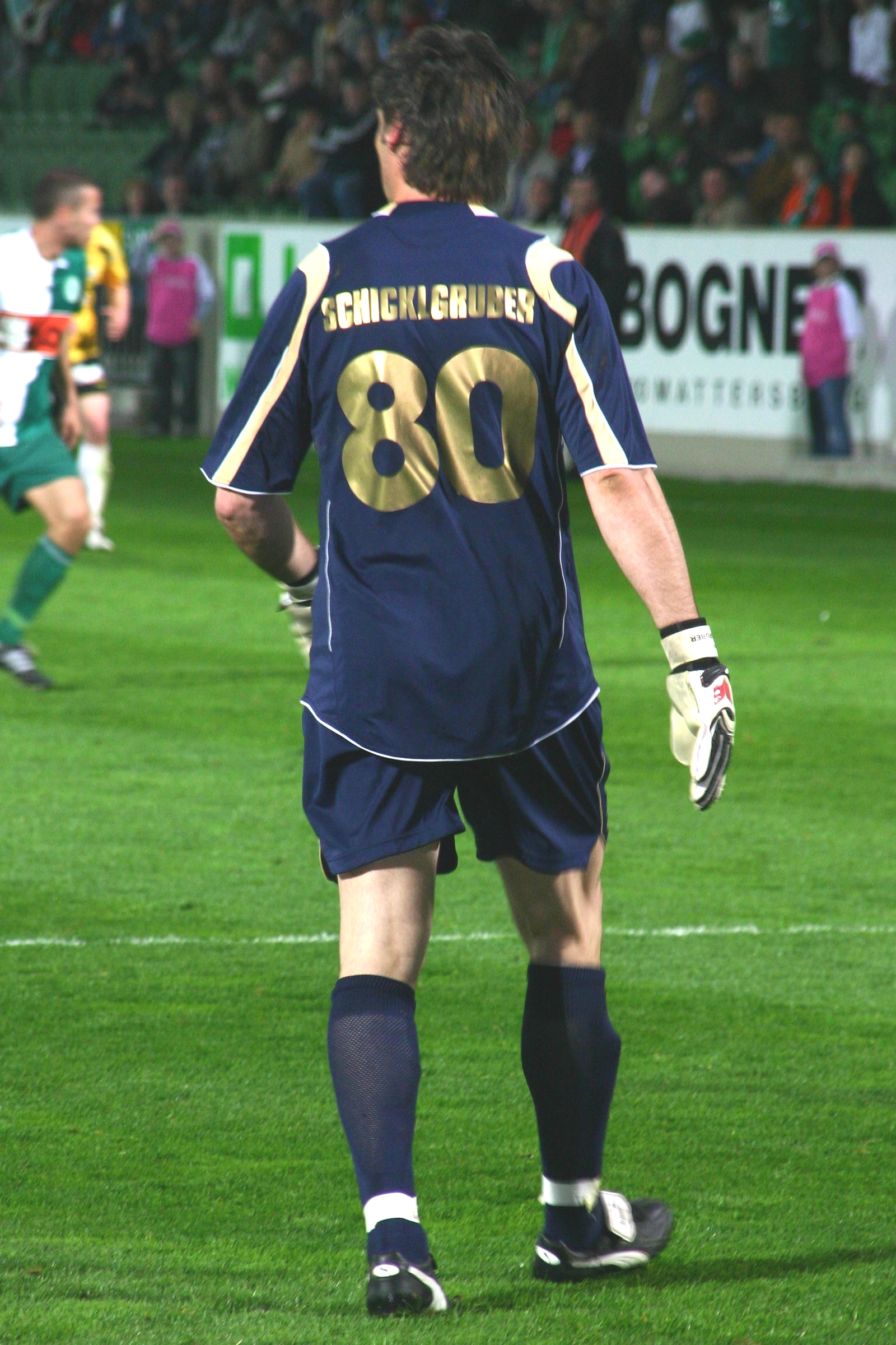 Josef Schicklgruber, Torhüter – SC Rheindorf Altach